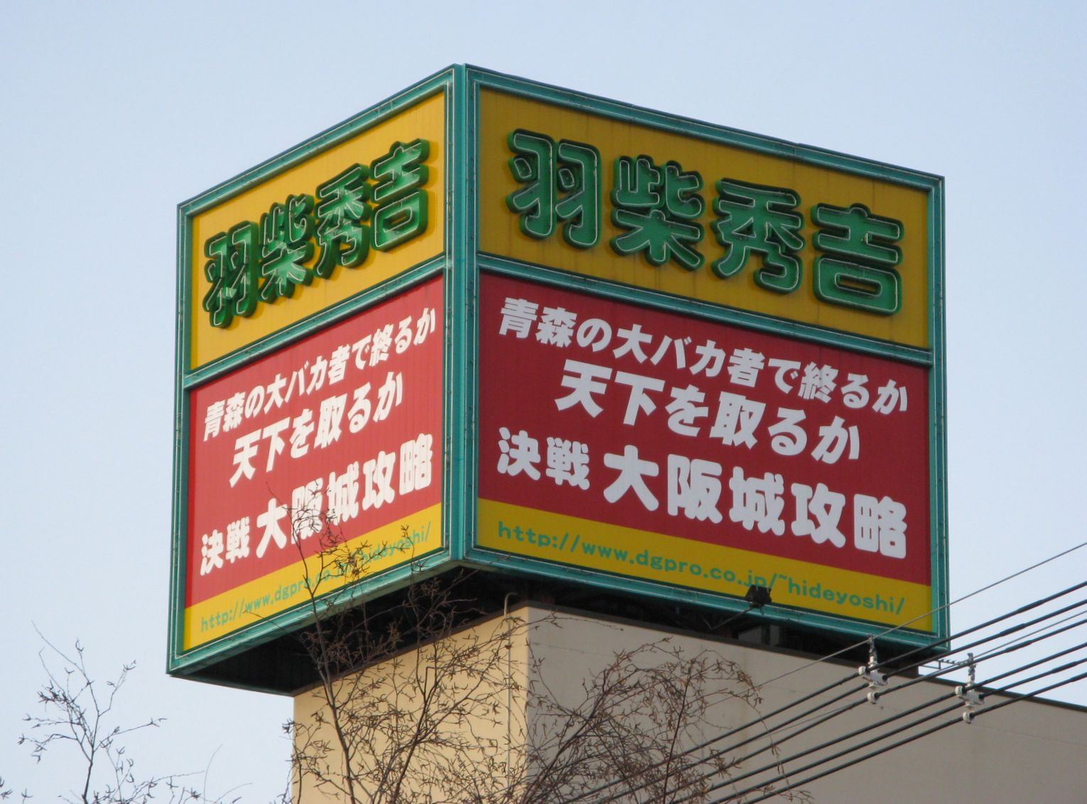 羽柴誠三秀吉（三上誠三）が五所川原市役所向かいのビルに掲げているネオン看板